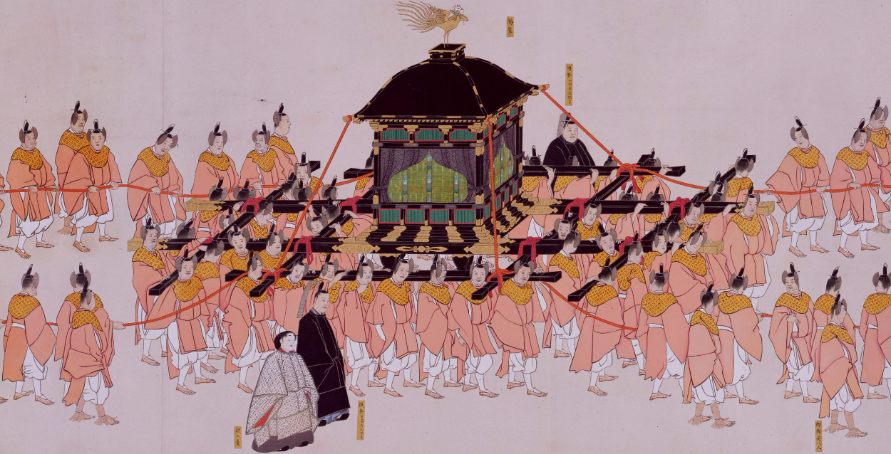 桜町殿行幸図２ 鳳輦